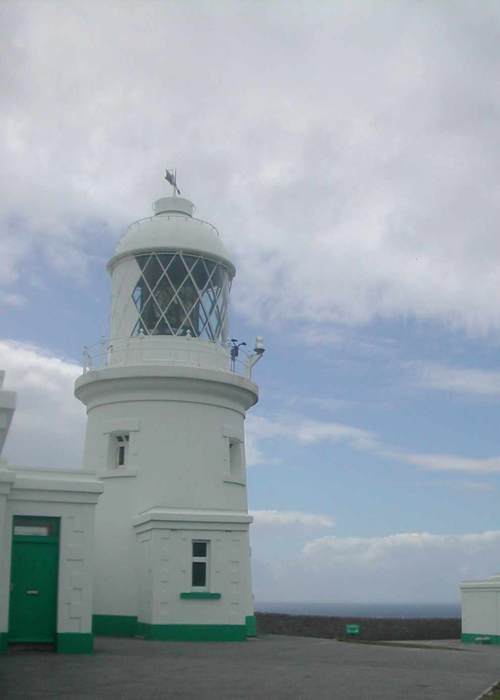 phare de Pendeen (Cornouailles)